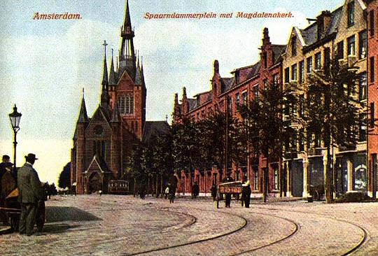 Oude prent van de Maria Magdalenakerk.